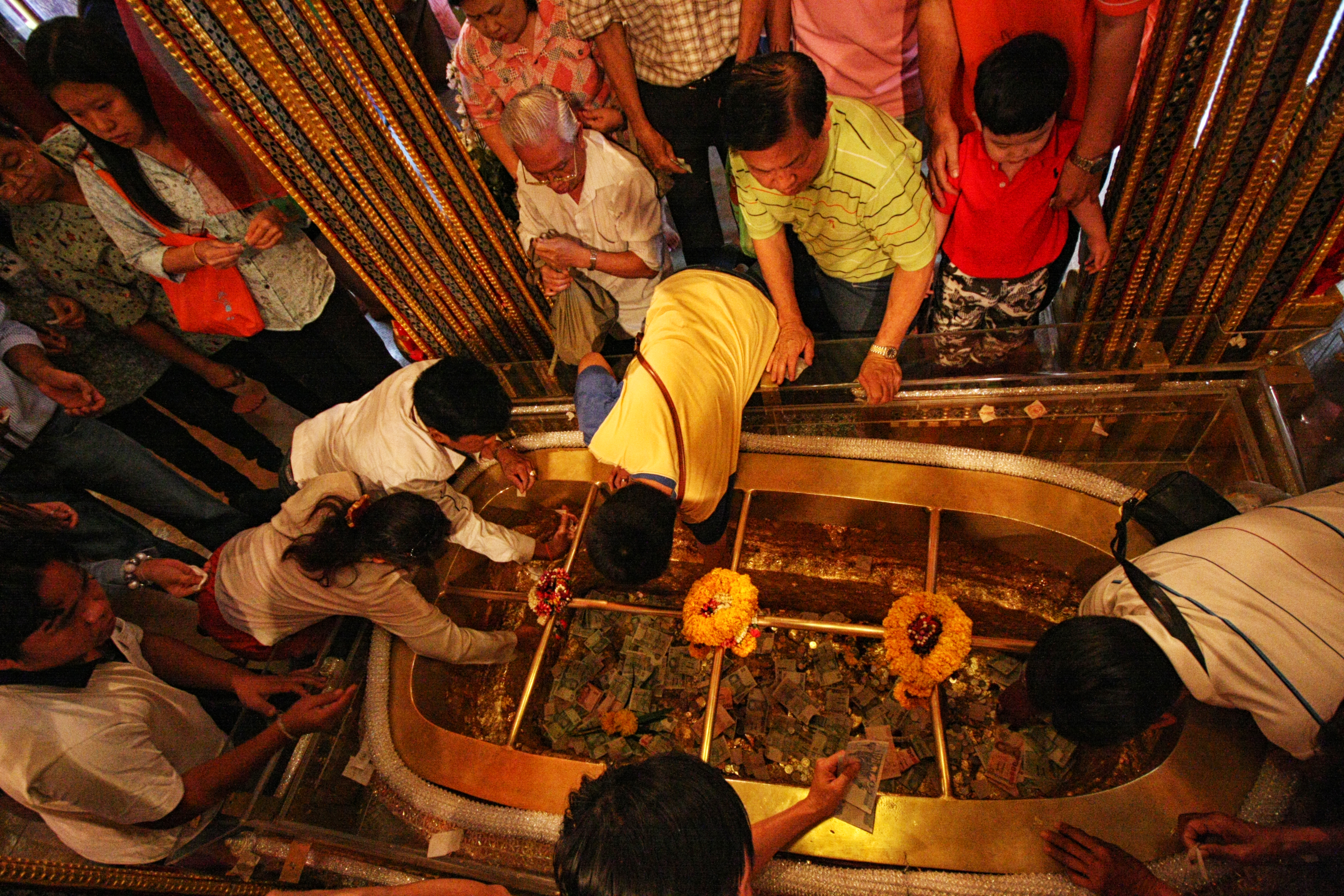 พระพุทธบาท (วัดพระพุทธบาท)